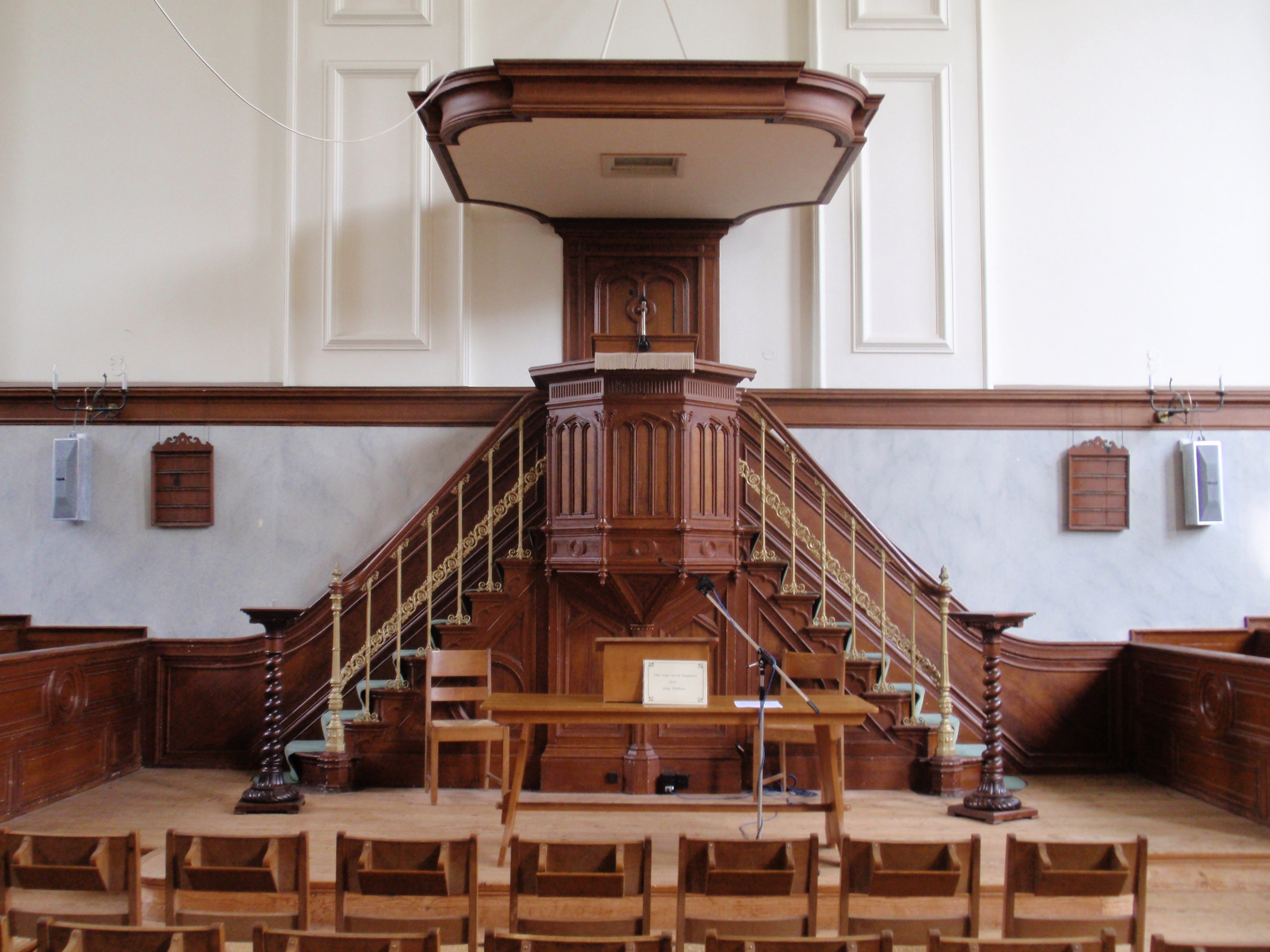 Foto uit Leiden tijdens rijksmonumentendag 2010. Lokhorstkerk.